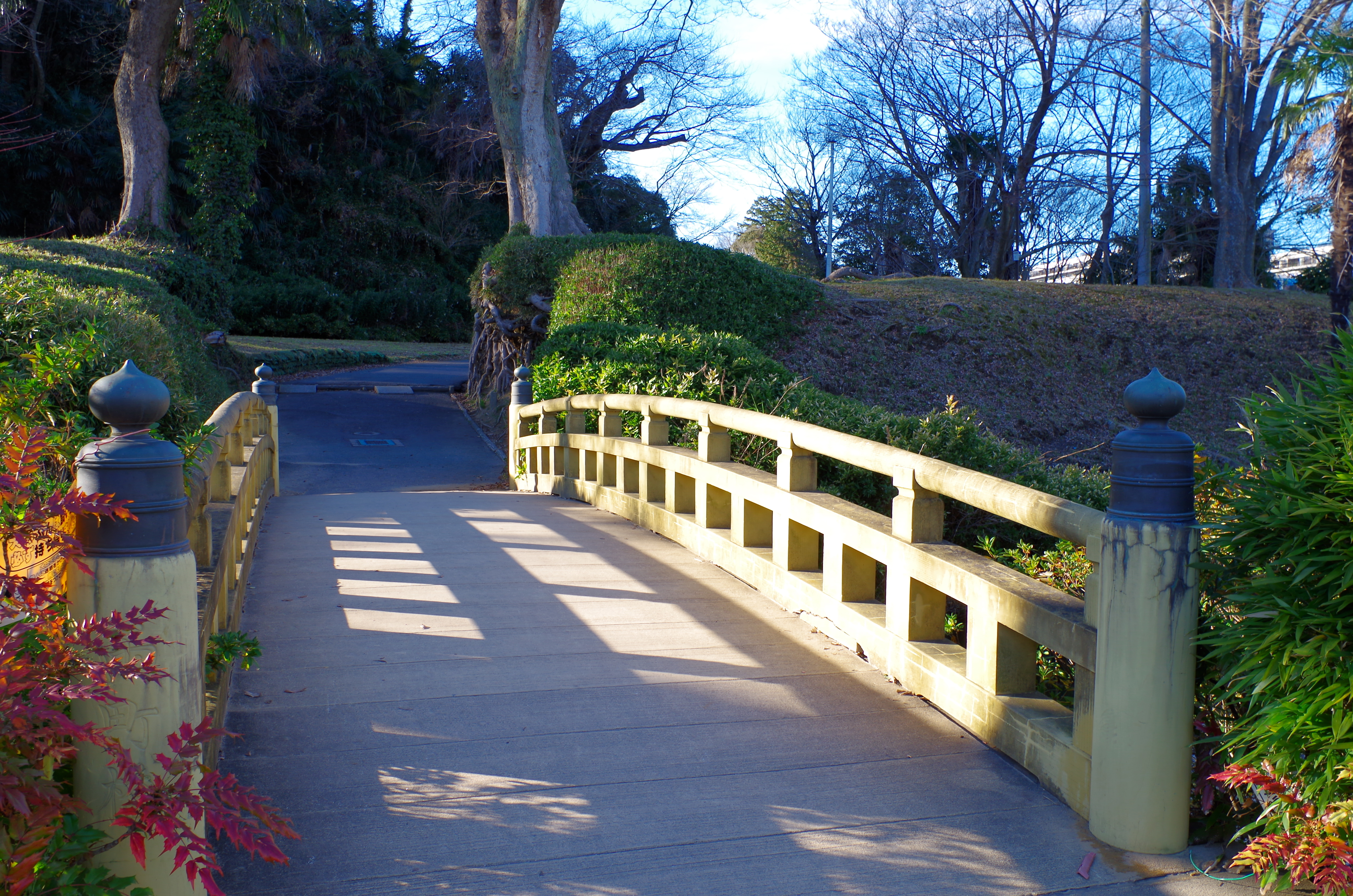 佐倉城址 両町橋 2015.1.02